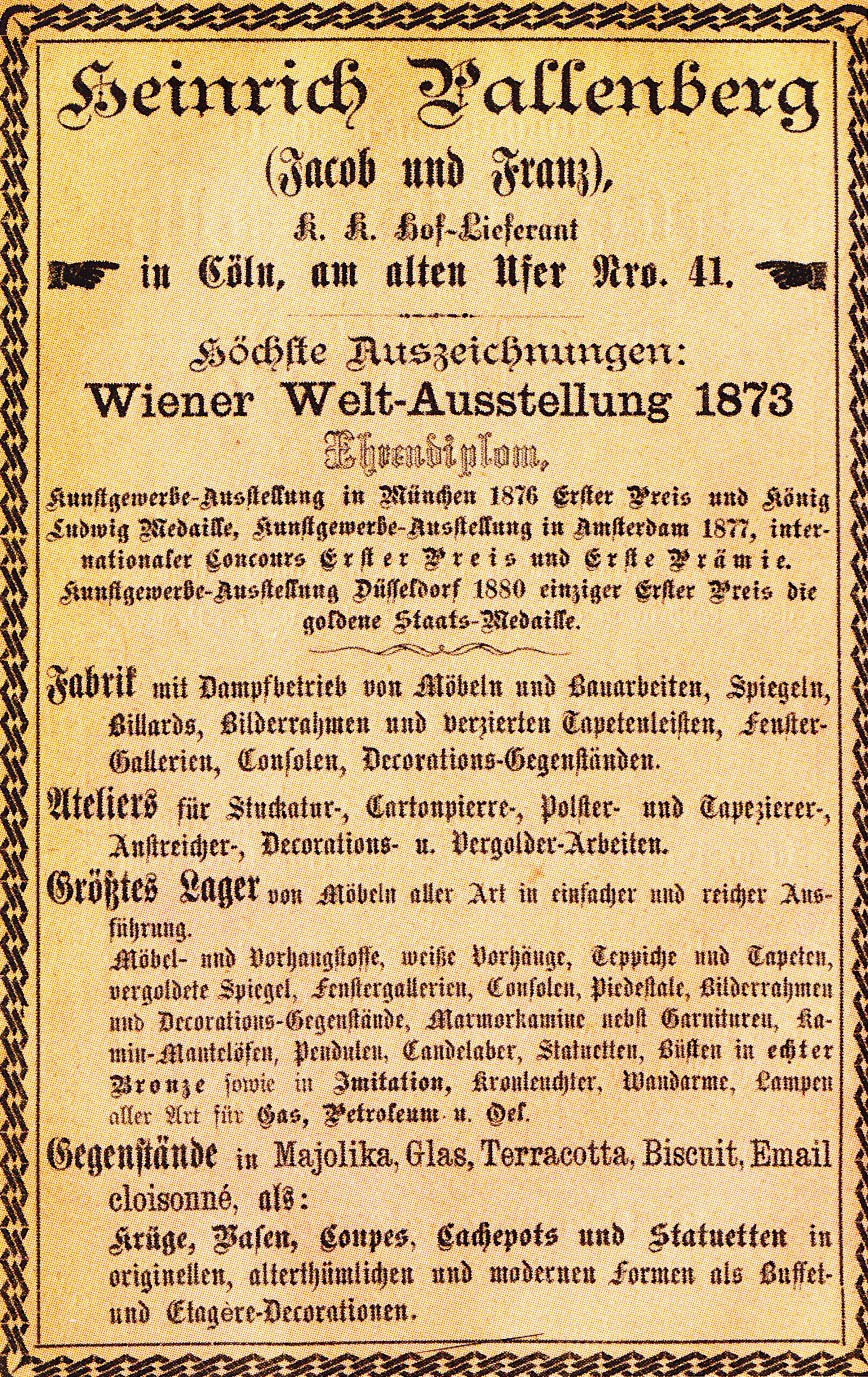 Anzeige der Möbelmanufaktur Heinrich Pallenberg vor 1895